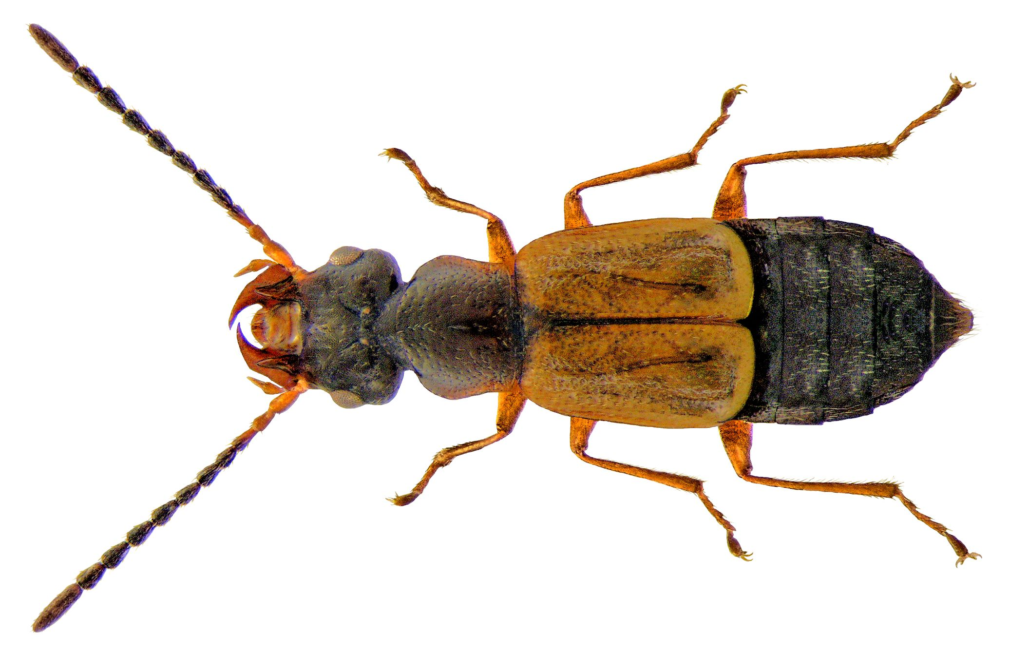 Familie: Staphylinidae Groesse: 3-4 mm Verbreitung: Europa Ökologie: in montanen Gebieten auf Blüten in der Nähe von Gewaessern Fundort: Italien, Südtirol, Wolkenstein, 1800 m leg.det. U.Schmidt, 1987 Photo: U.Schmidt, 2009